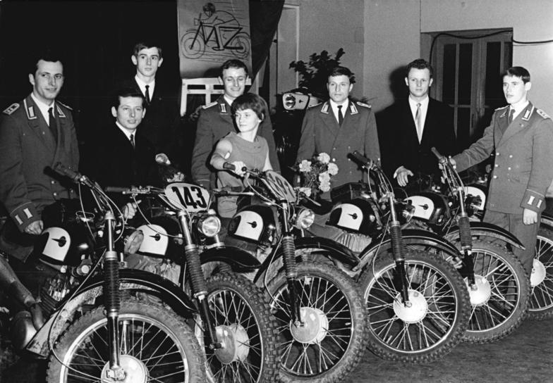 Zentralbild-Thieme-Sche-28.1.1968-Zschopau: Sportler des Jahres ausgezeichnet. Die glücklichen Sieger der "Junge Welt" Umfrage 1967, Karin Janz, Roland Matthes und die MZ--Trophy-Mannschaft, wurden am 27.1.1968 im Zschopauer Motorradwerk als "Sportler des Jahres" ausgezeichnet. Auf unserem Foto von links nach rechts: Hans Weber, Werner Salewski, Roland Matthes, Peter Uhlig, Karin Janz, Klaus Teuchert, Karl-Heinz Wagner und Klaus Halser."